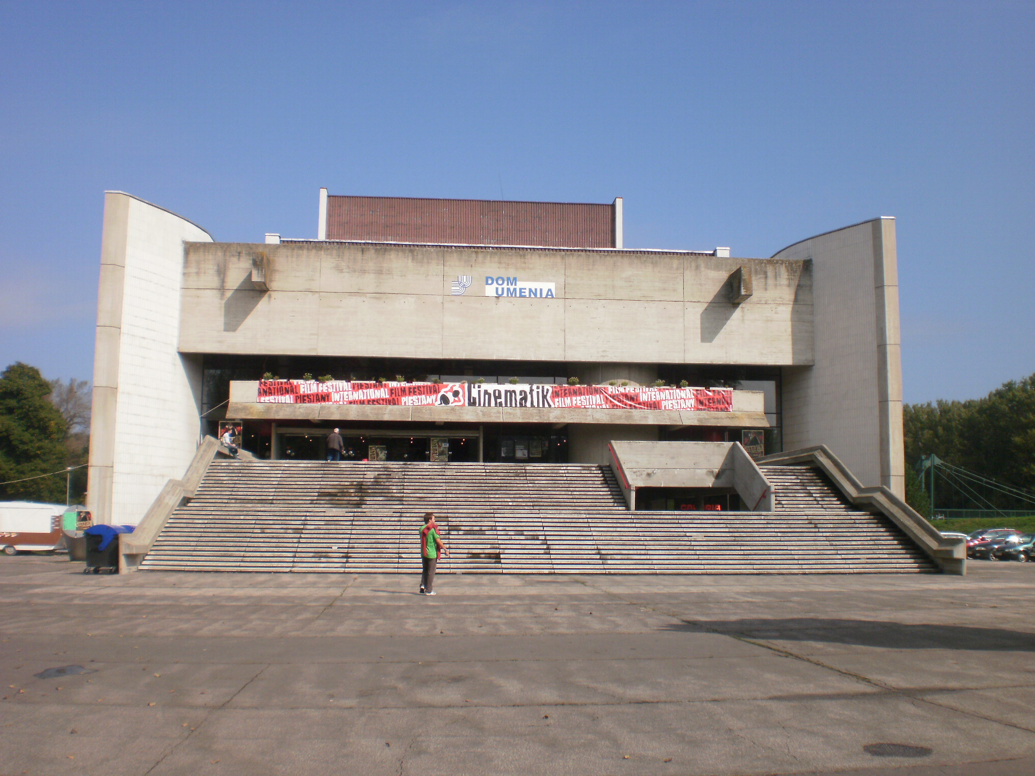 Dom Umenia, hlavná sála Cinematiku.